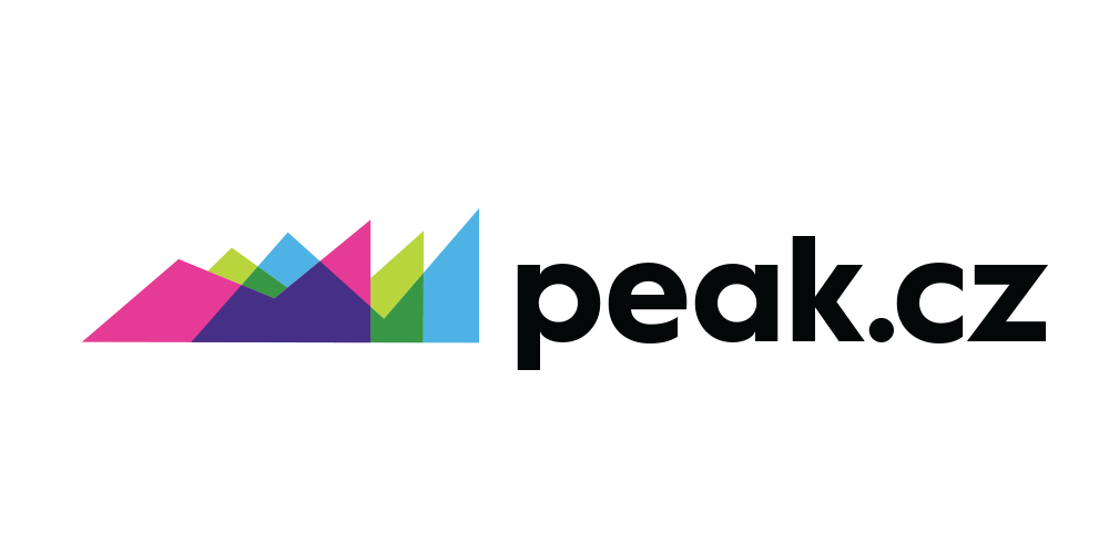 Logo online magazínu Peak.cz, které vzniklo pro potřeby prezentace tohoto média. Přidáním nedošlo k porušení autorských práv